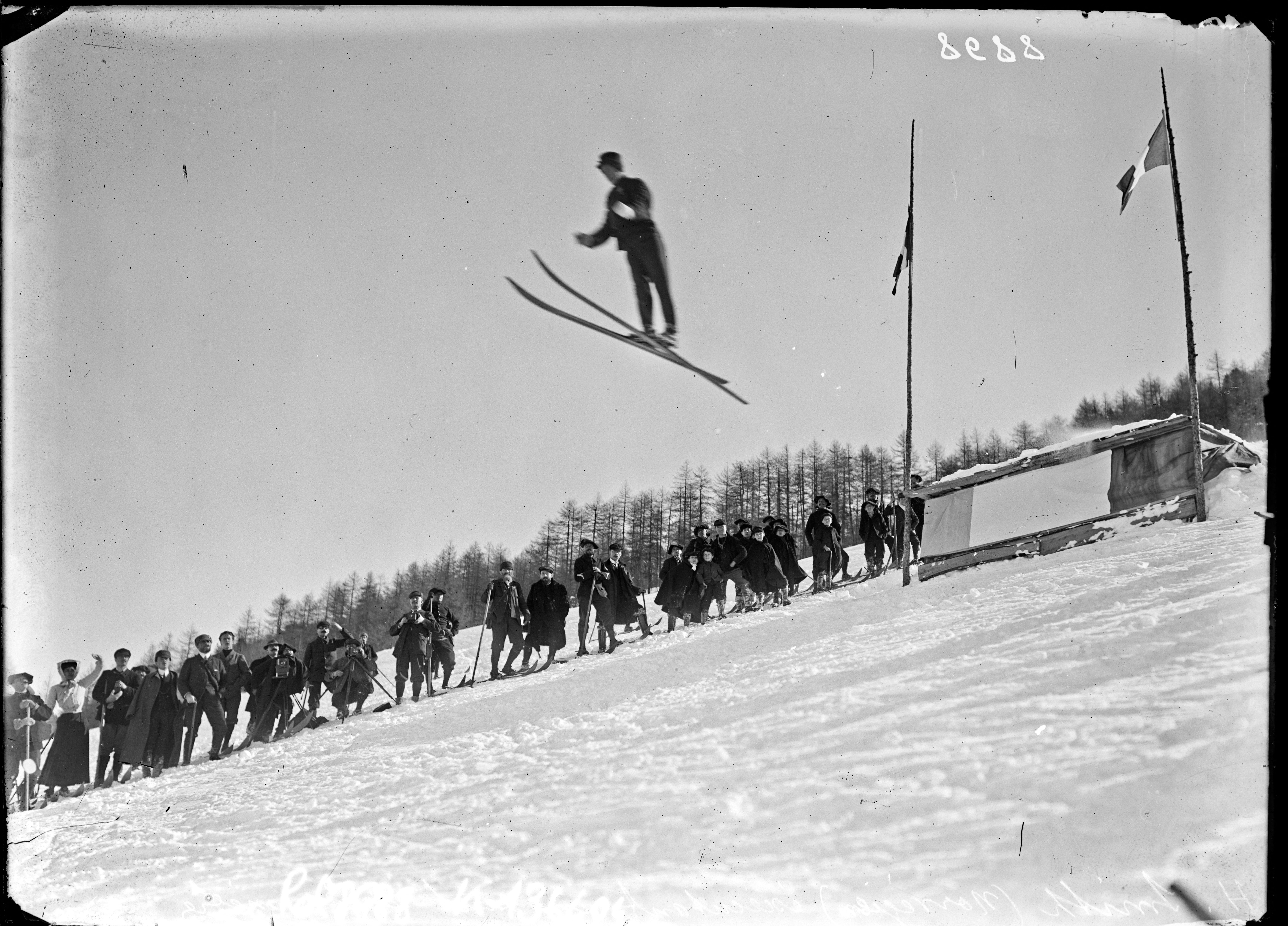 H. Smith (Norvégien) exécutant un saut de 30 mètres [à ski, 11 février 1907, à Montgenèvre] : [photographie de presse] / [Agence Rol]